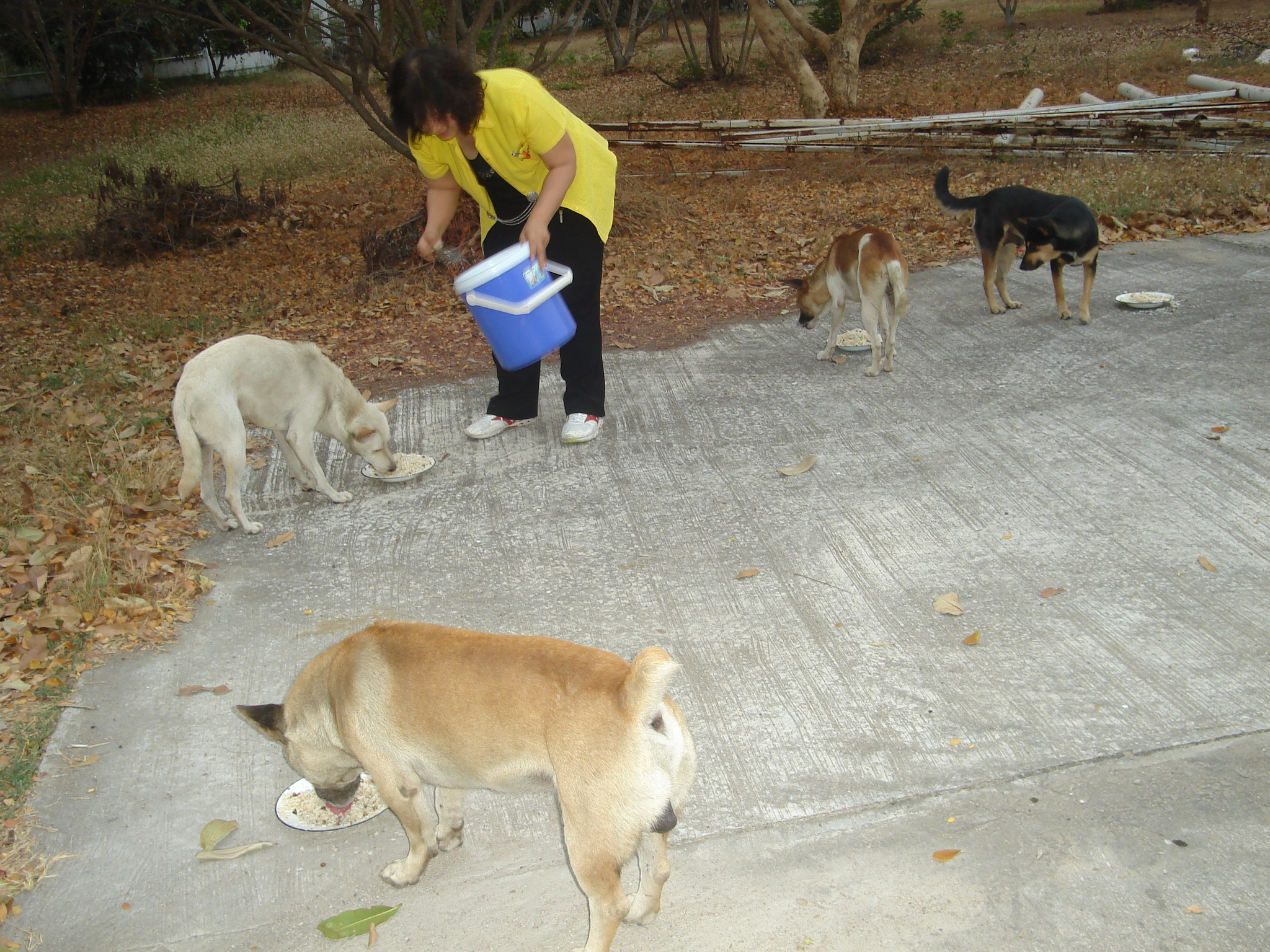 Feeding dogs (taken in Tak, Thailand)